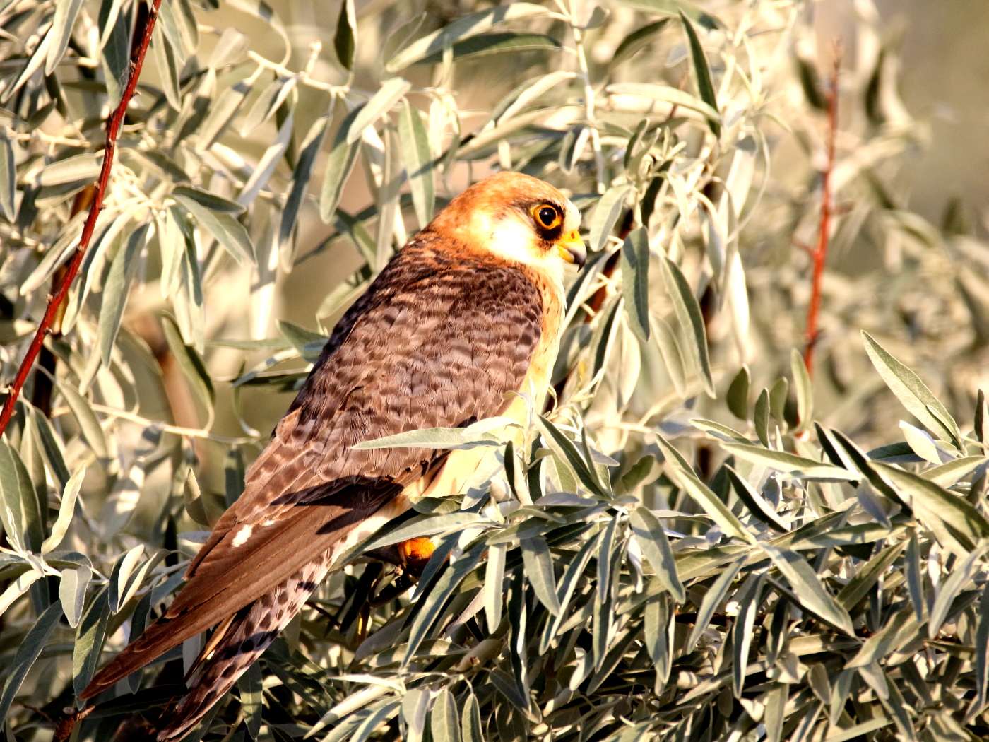 weiblicher Rotfußfalke